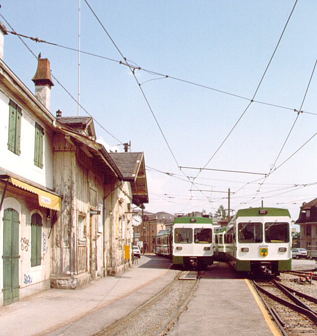 Scène à l’ancienne gare de Lausanne-Chauderon, mai 1992.